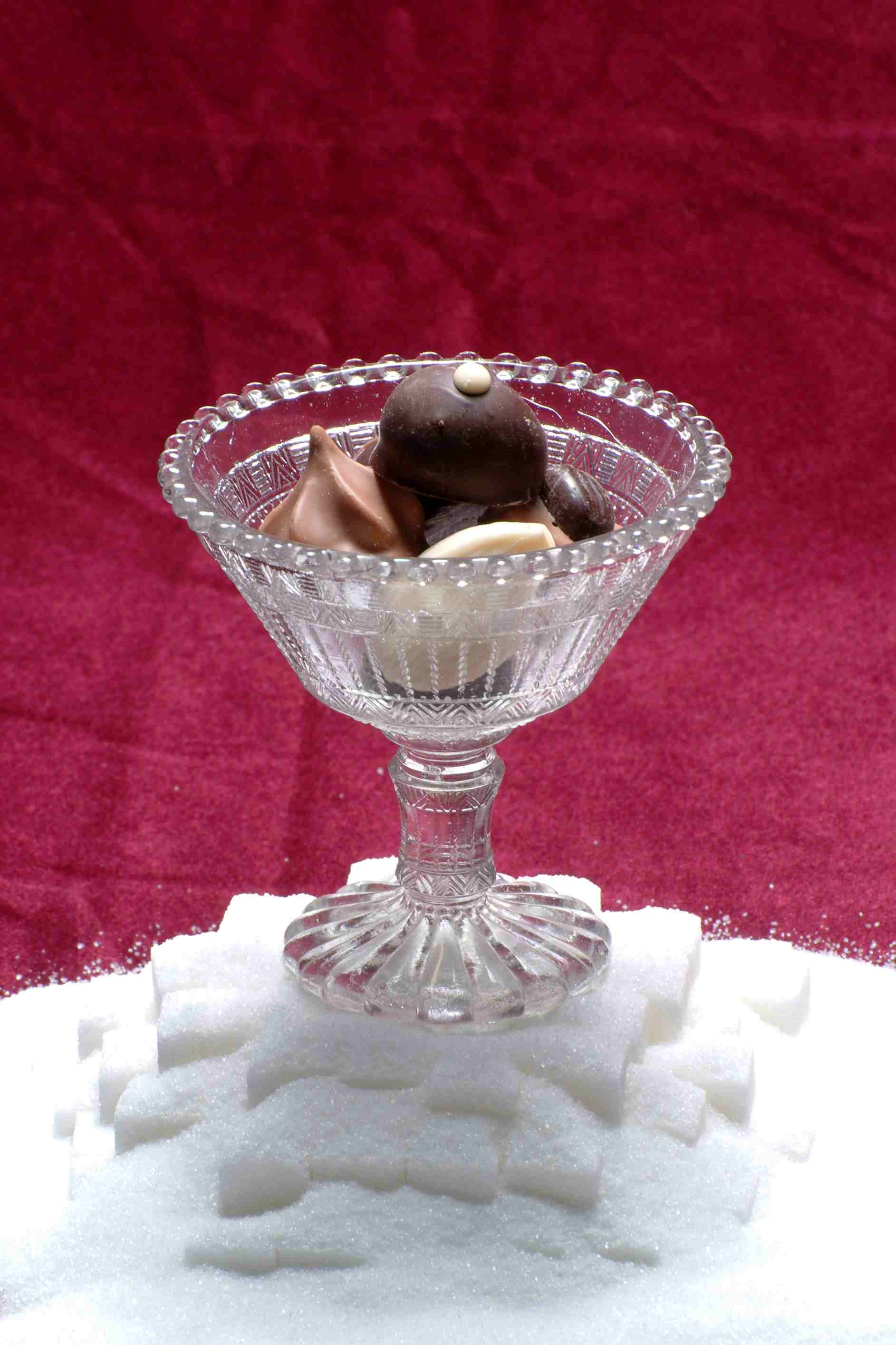 Plakatfoto zur Sonderausstellung des Rieser Bauernmuseums Maihingen 2009 "Die süße verführung - Zucker, Schokolade & Co."